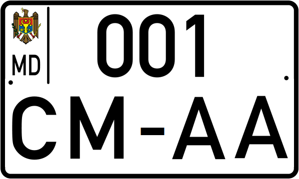 Мотоциклетный номер Молдовы